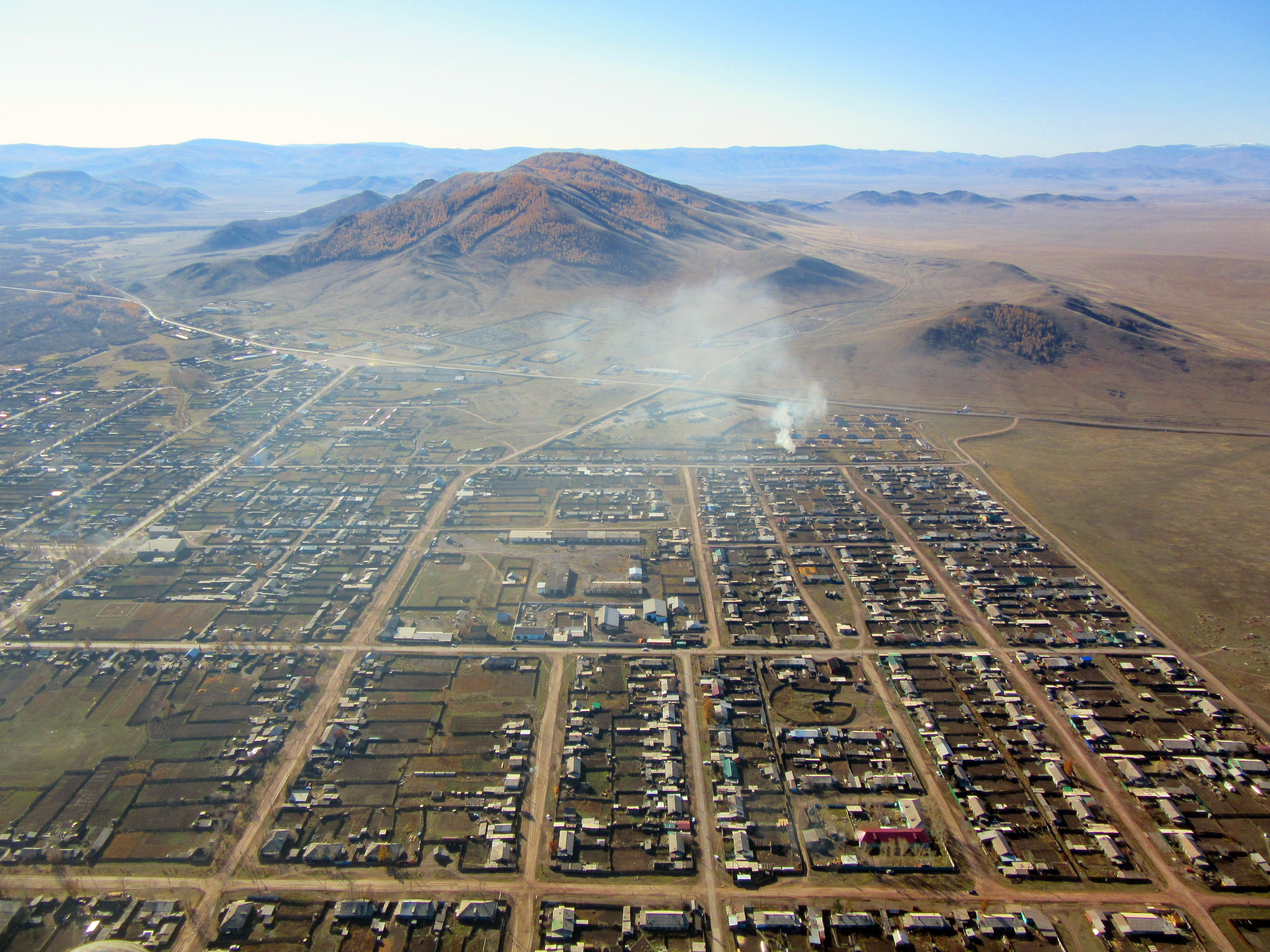 Туран с высоты птичьего полёта. 10 октября 2015г.